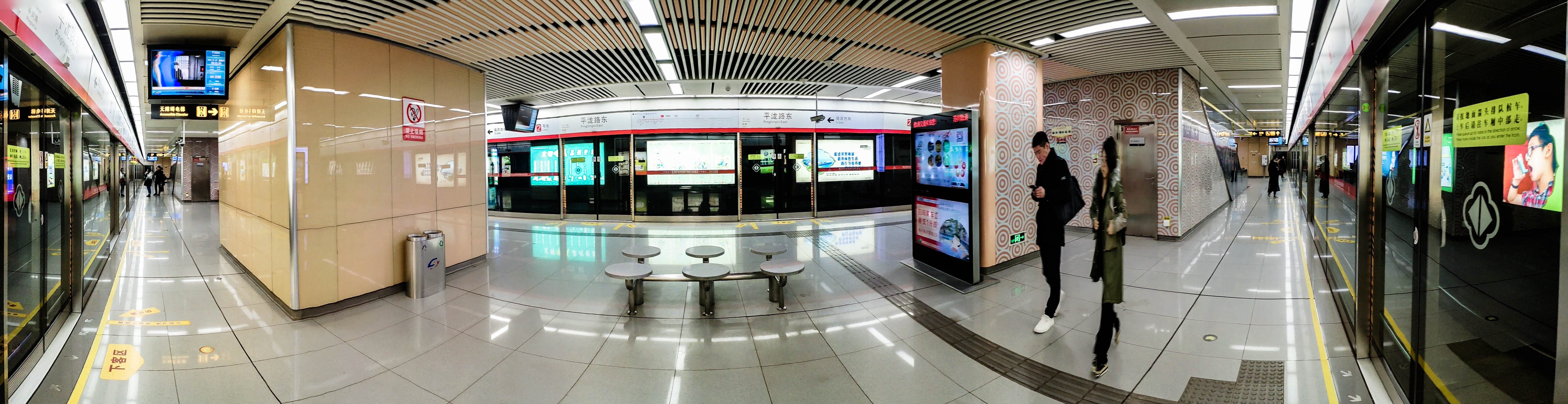 中文（中国大陆）: 平泷路东站往桑田岛方向站台全景